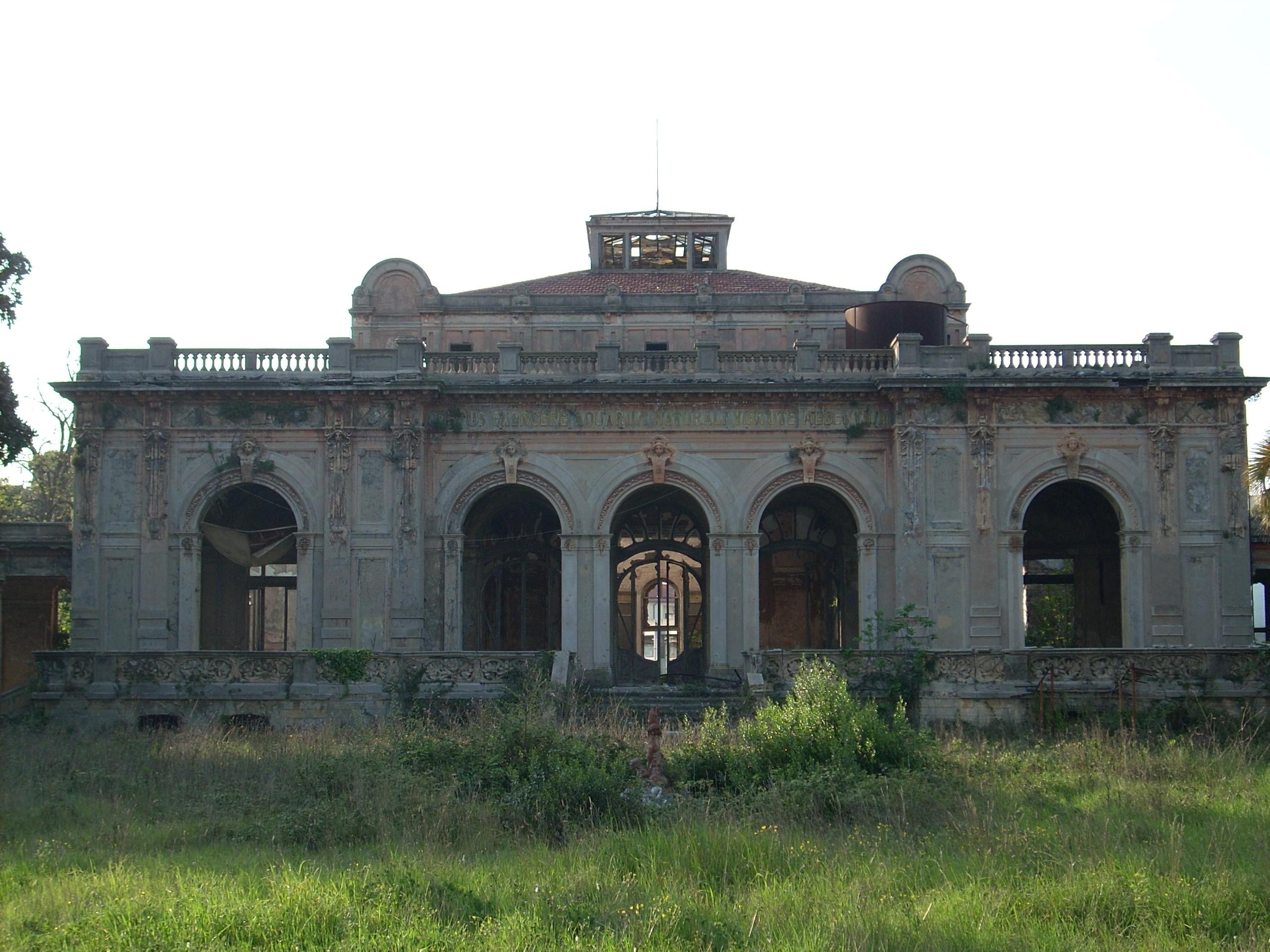 Livorno: lo Stabilimento termale Acque della Salute costruito ad inizio Novecento da Angiolo Badaloni e oggi negligentemente abbandonato. Nella foto il padiglione principale. La foto compare nel libro Sul Lungomai di Livorno, di Simone Lenzi, editore Laterza, 2013, p. 54... senza crediti.